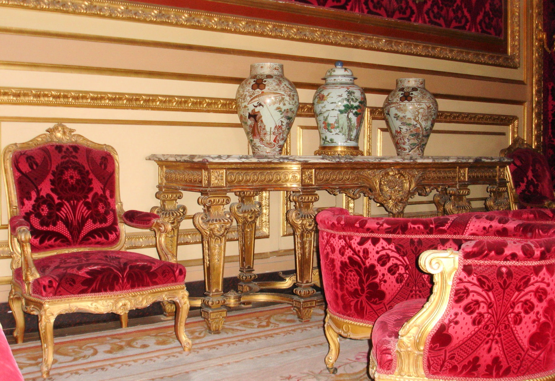 Fauteuil à la reine et siège indiscret d'époque Second Empire, Salon des appartements Napoléon III, Palais du Louvre, Paris, France. own work